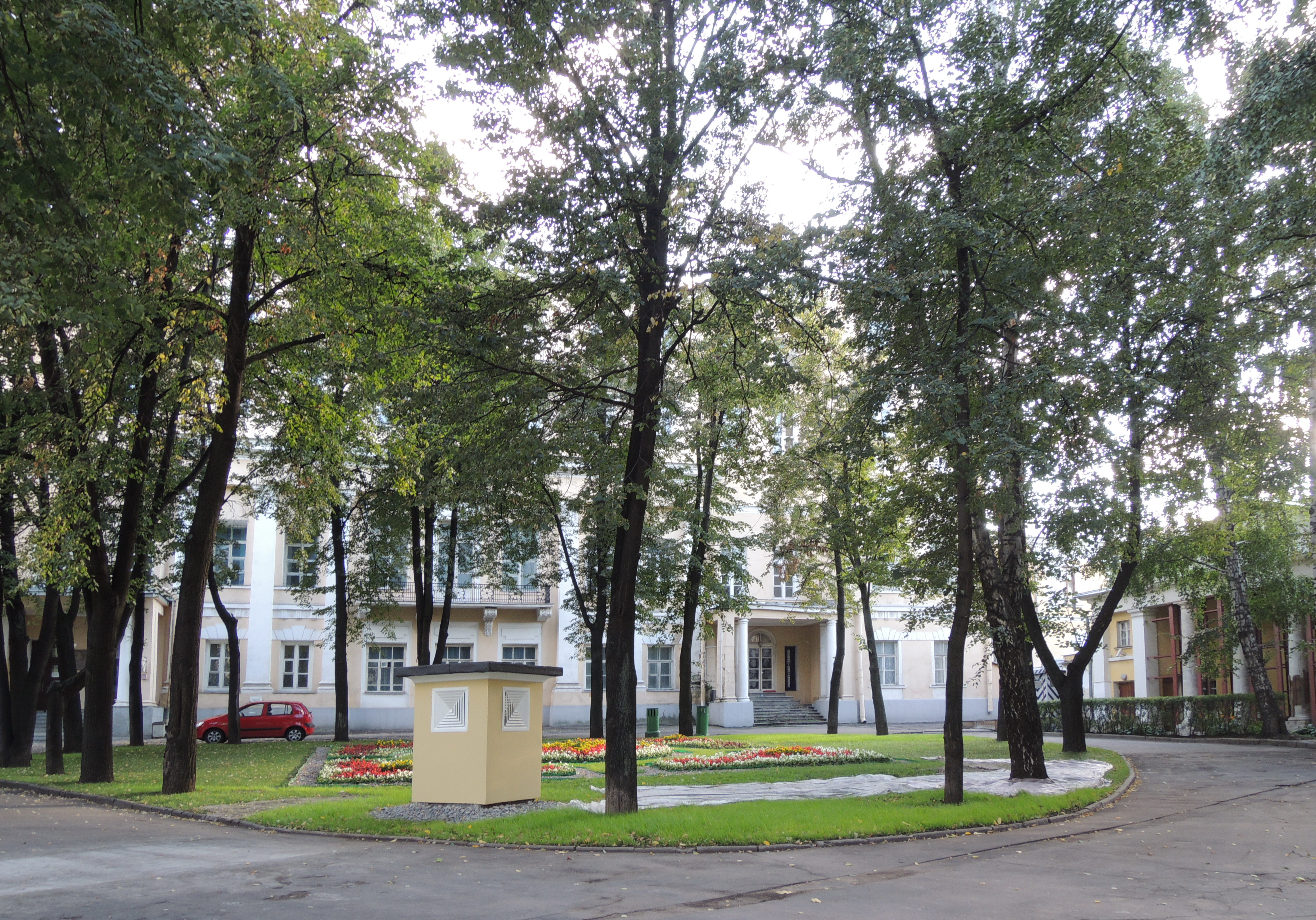 Усадьба Голицыных в Знаменском переулке